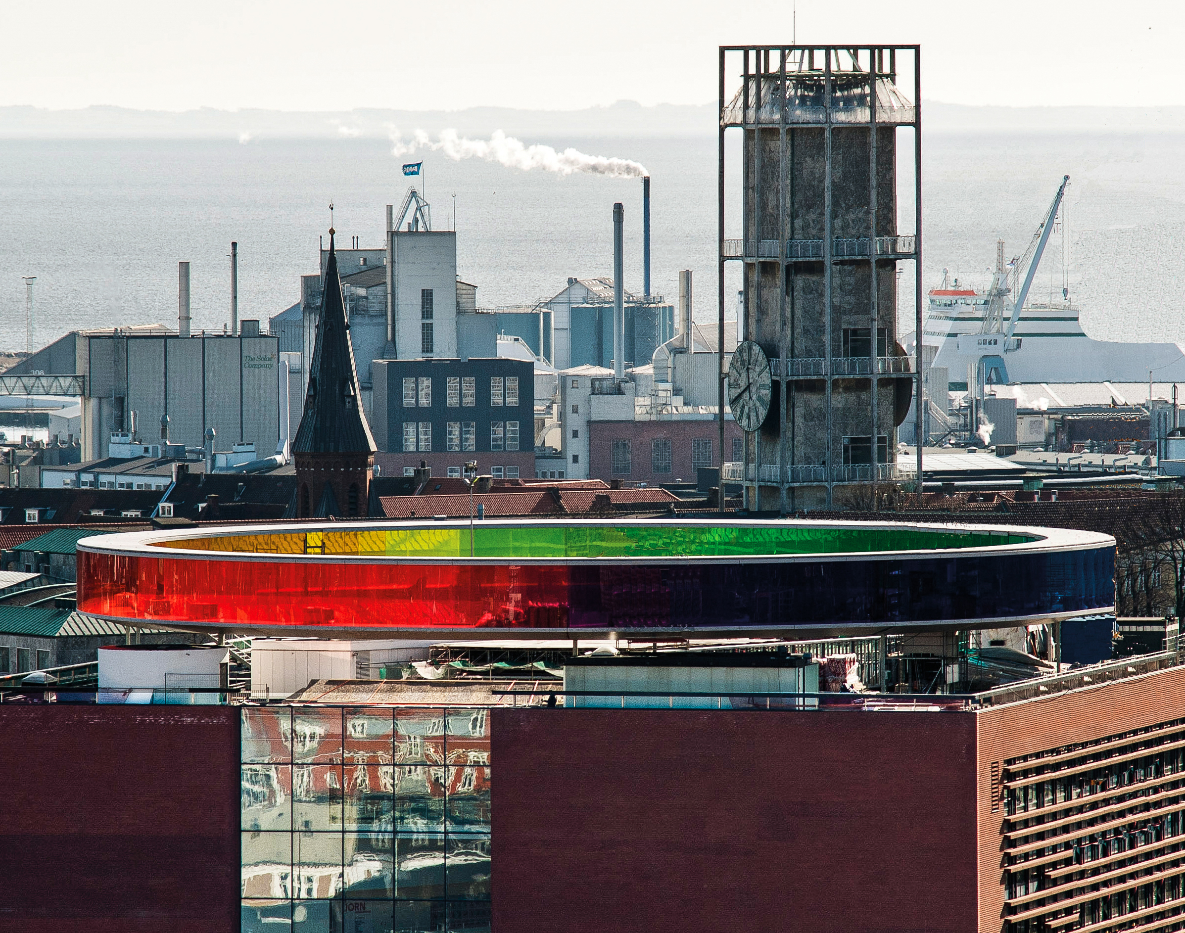 Your rainbow panorama, installation af Olafur Eliasson